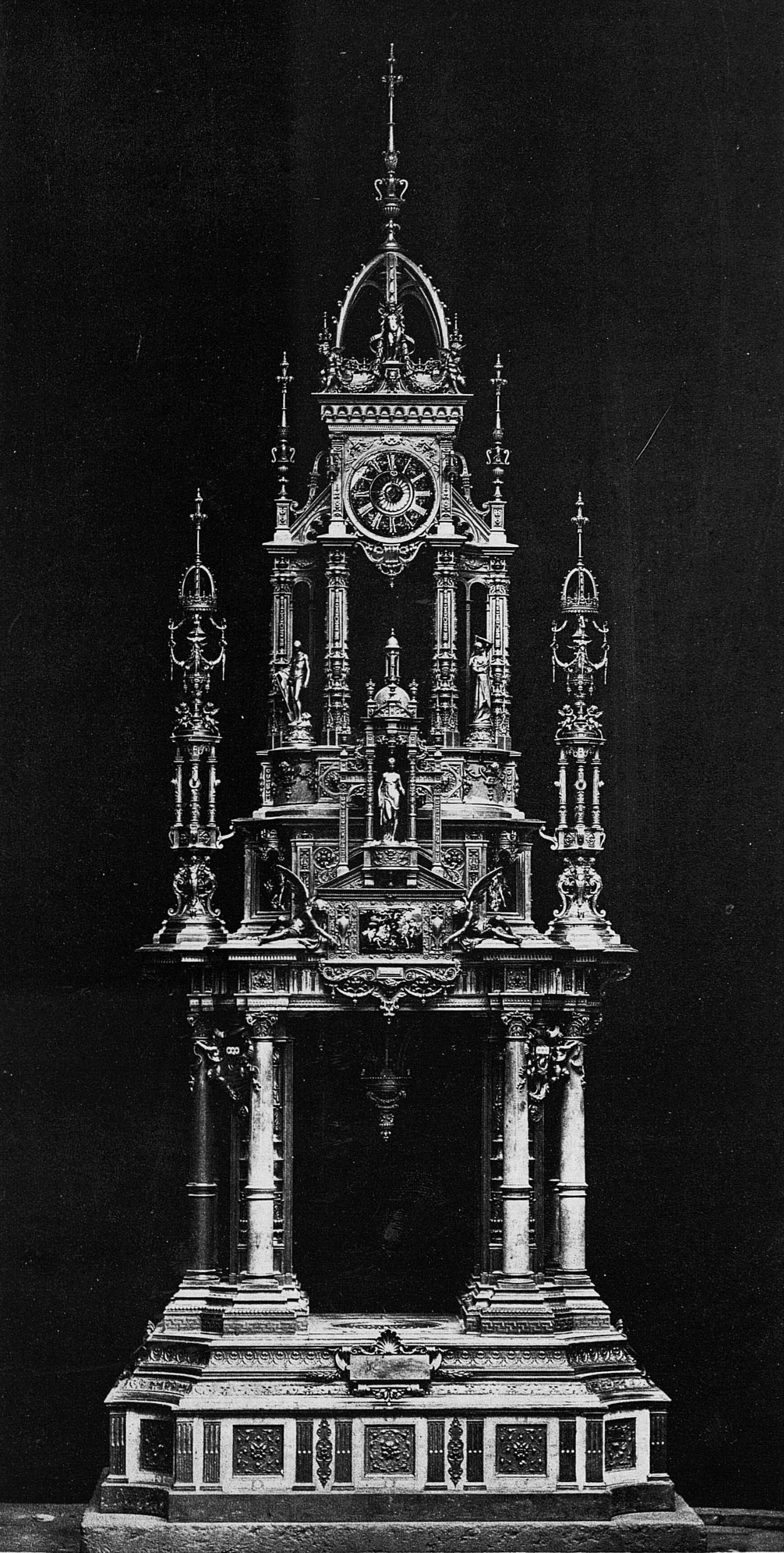 Grande horloge en bronze doré, composée par Constant Sévin, exécutée par la maison Ferdinand Barbedienne et présentée à l'Exposition universelle de 1878.